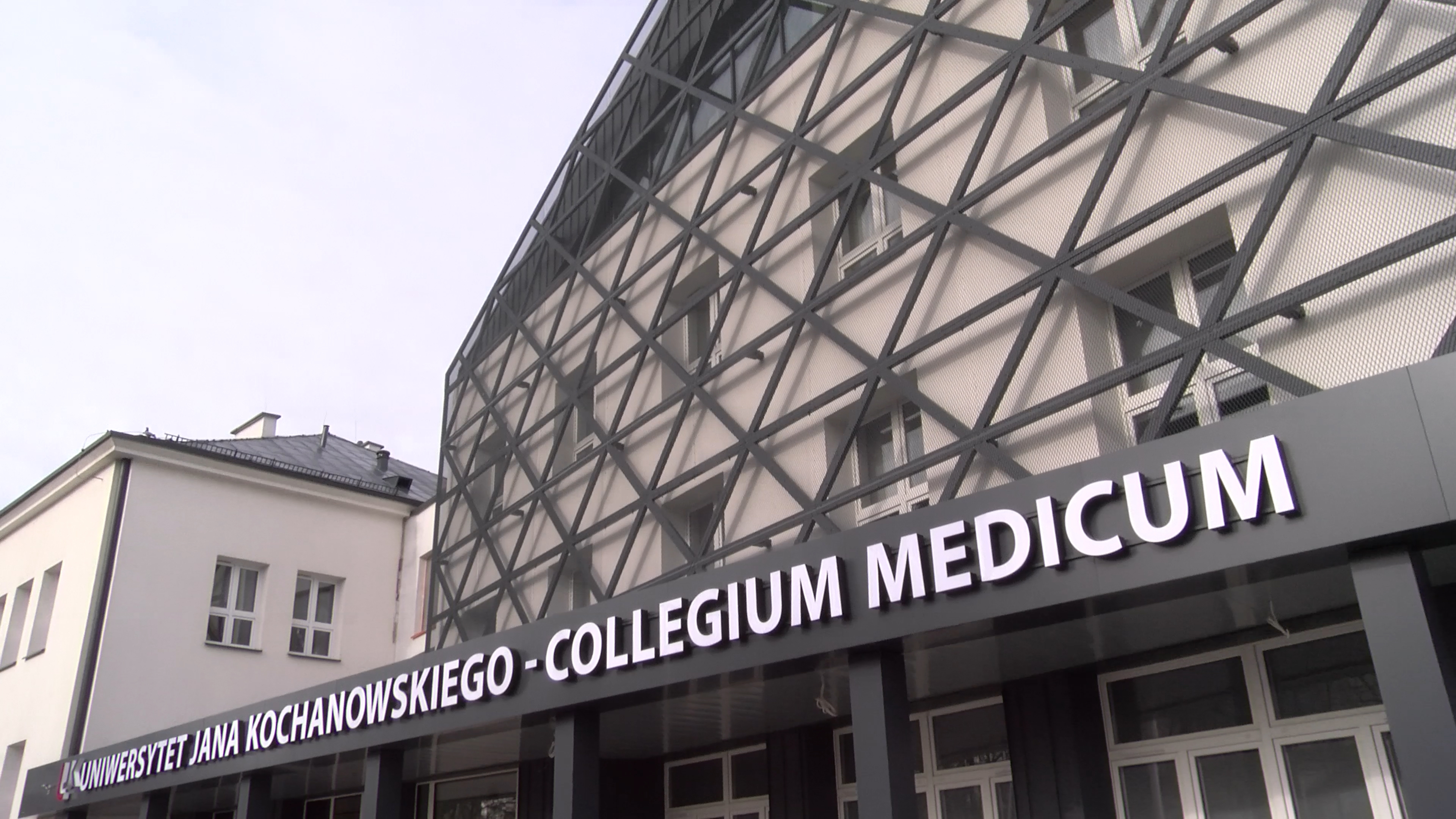 Budynek Collegium Medicum